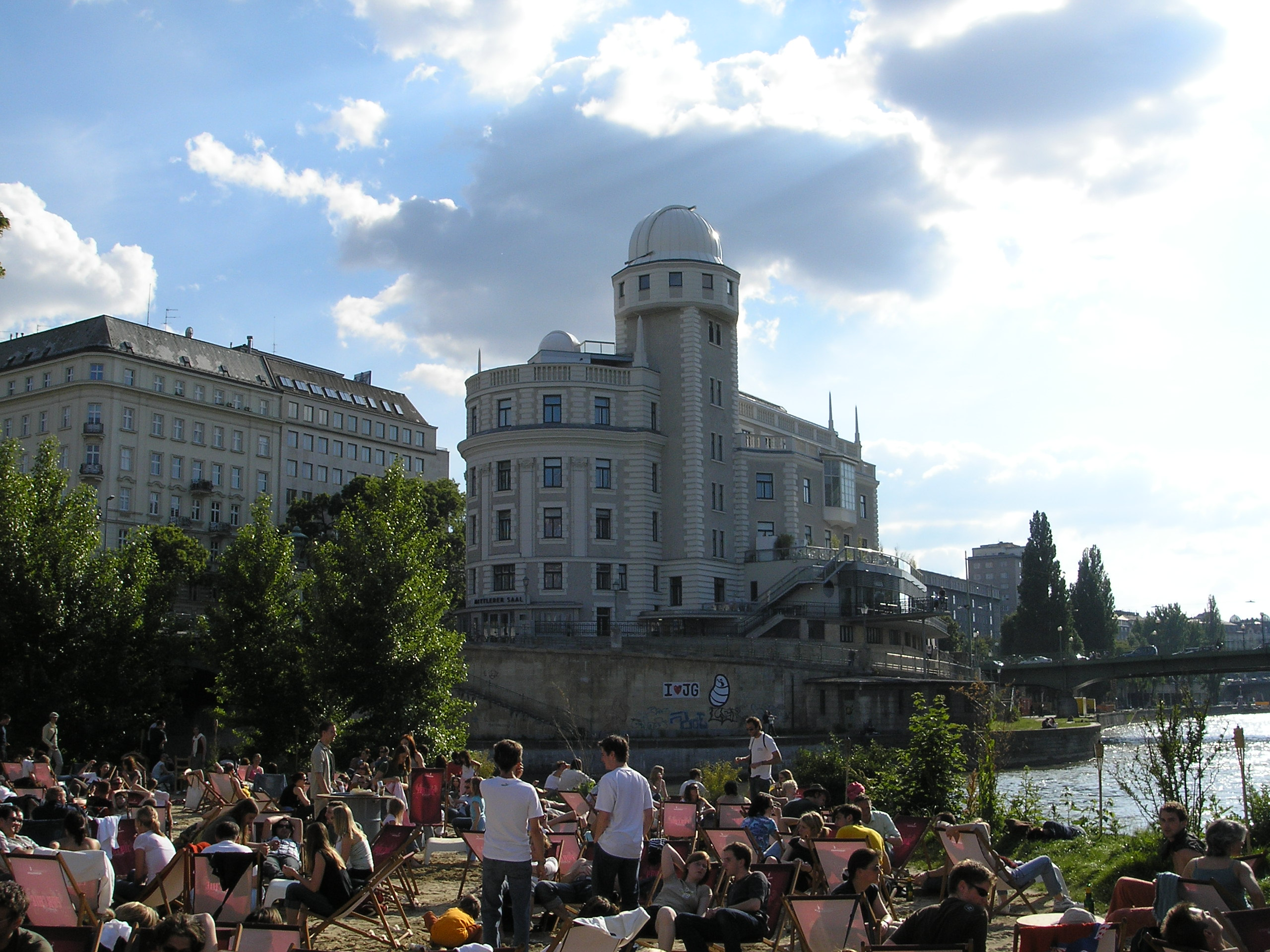 Urania in Vienna